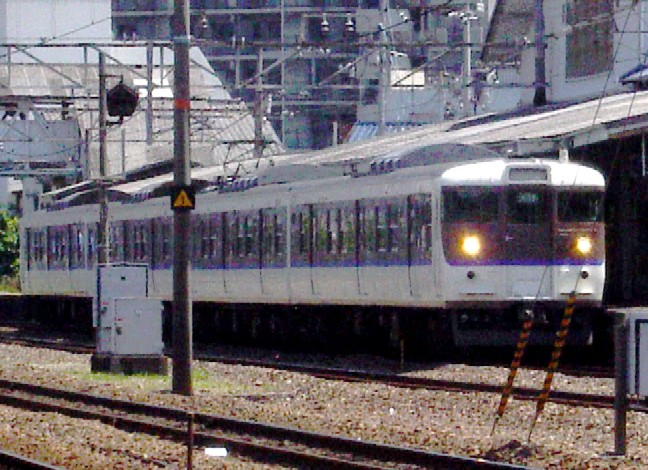 2004年6月 本人撮影 115形電車 向洋駅横